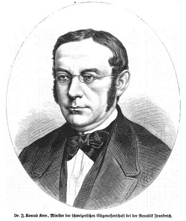 Johann Konrad Kern, schweizer Staatsmann im 19. Jh.